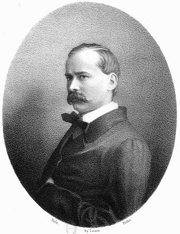 French playwright Théodore Barrière (1823-1877)